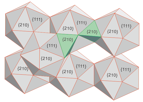 黄鉄鉱型三角二十面体